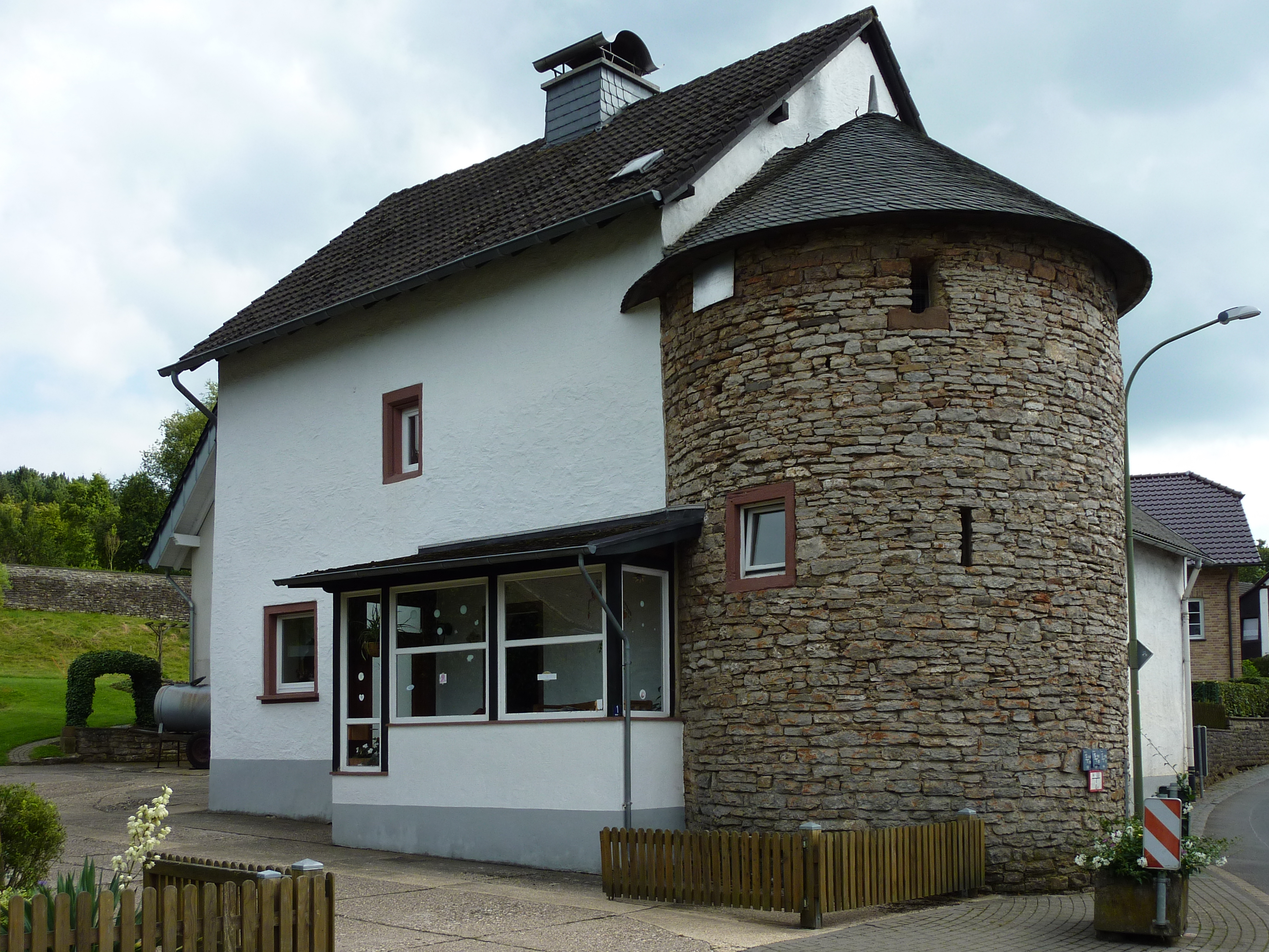 Rohr, Hochstr. 1; ehem. Burg 2